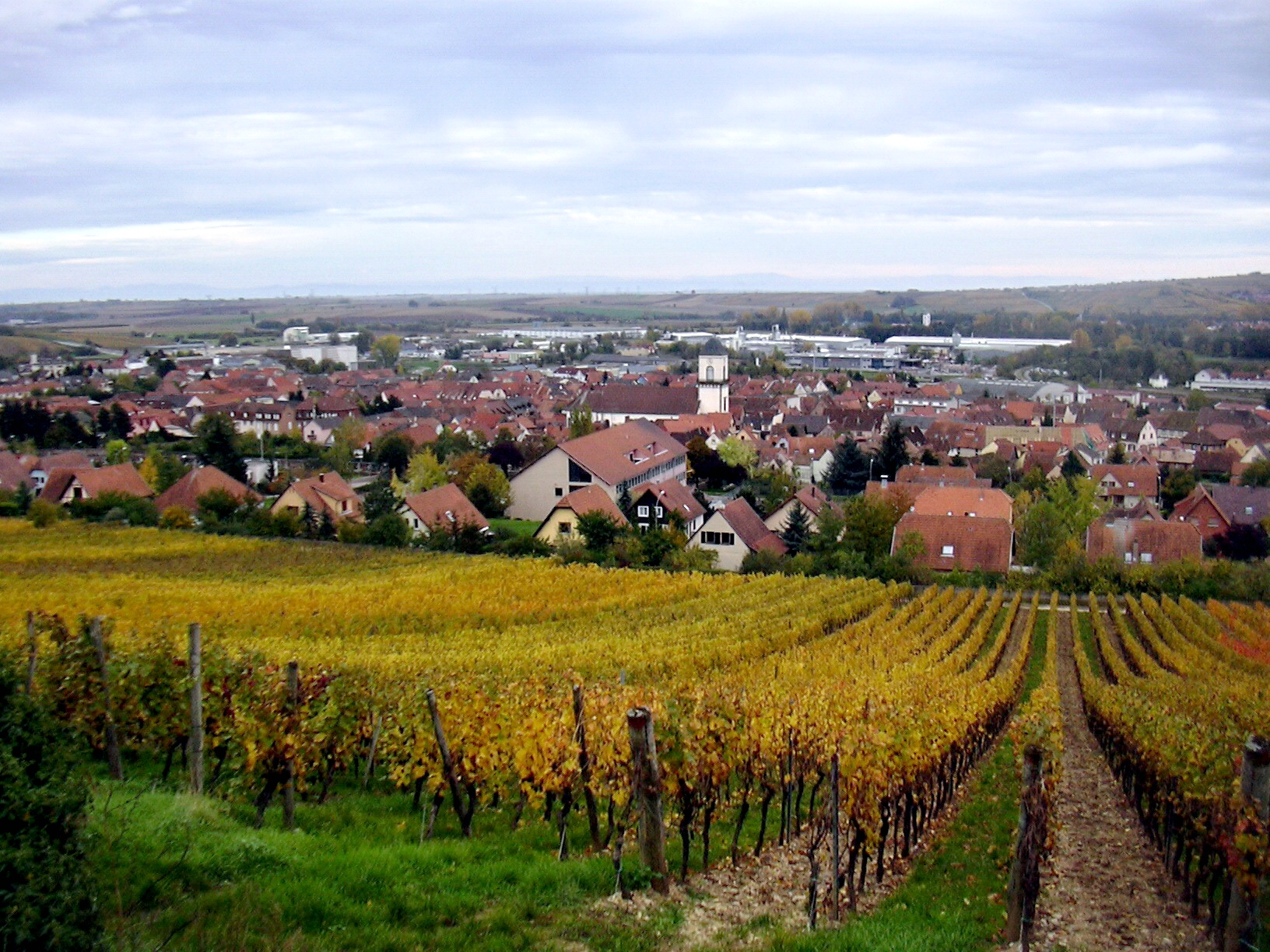 Marlenheim, lookout